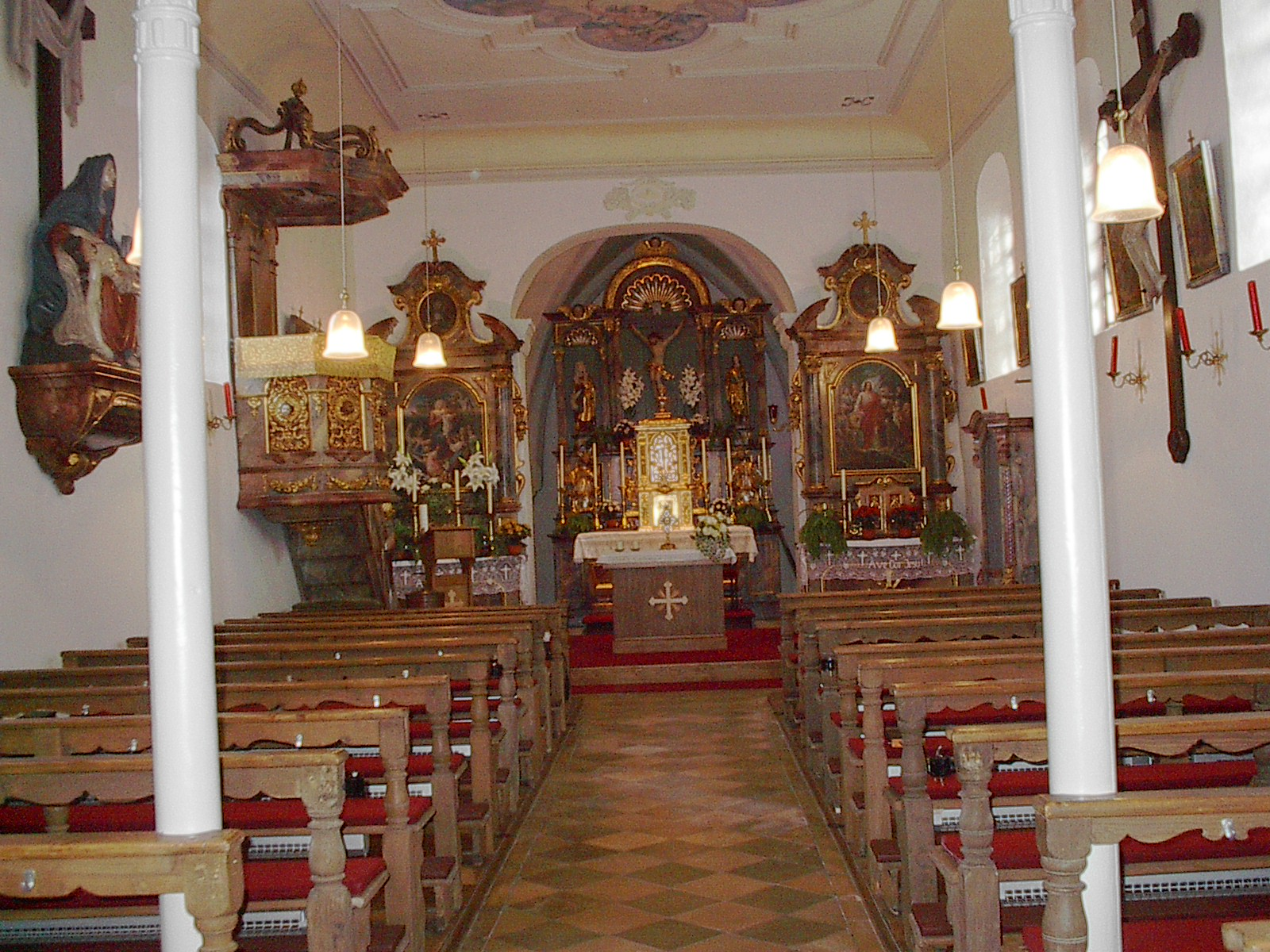 Das Innere der Heilig-Kreuz-Kirche von Joshofen.